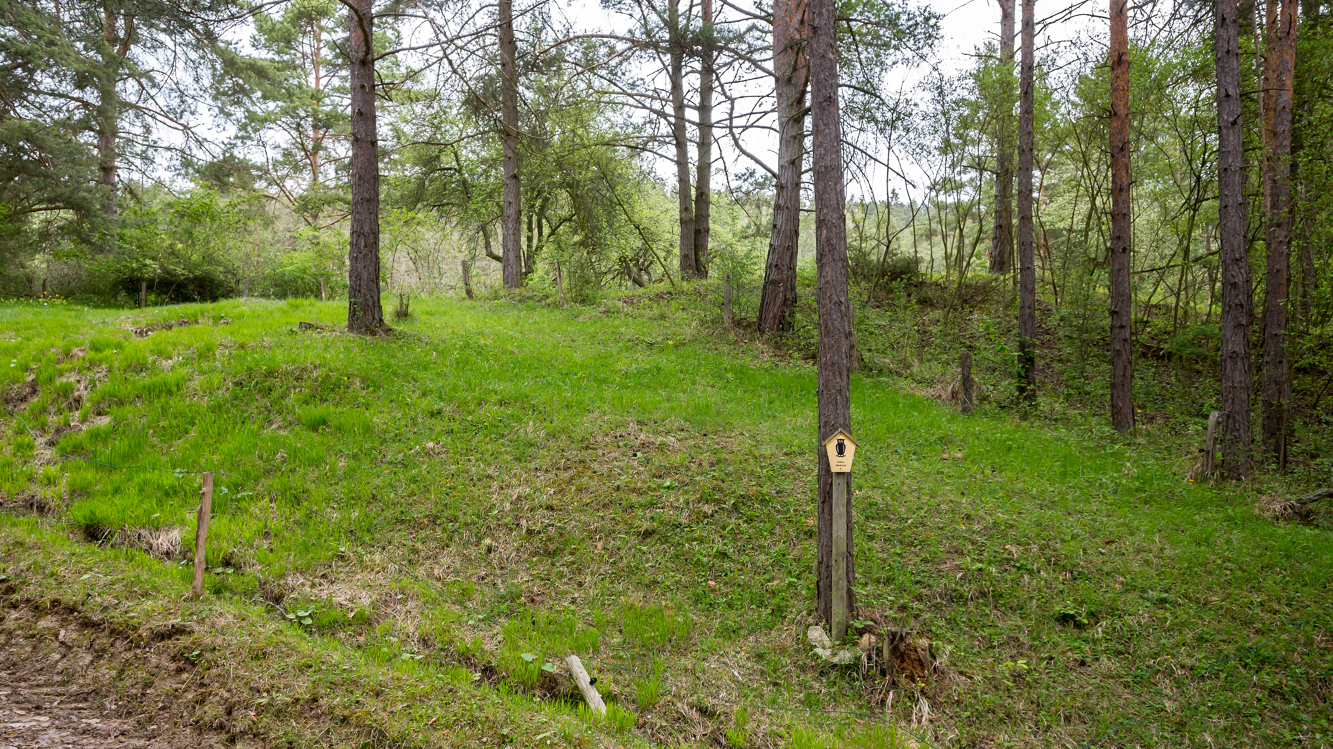 Quellmoor am Hangfuß Listen Nr. 27 Altremda I